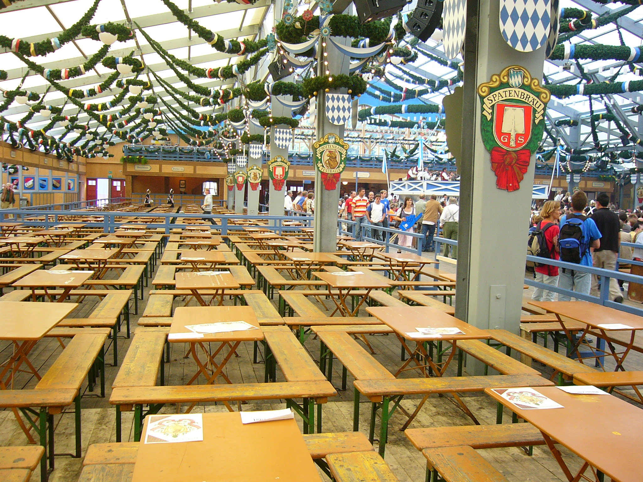 Schottenhamel-Festzelt: im Unterschied zu anderen Bierzelten unübliche Anordnung der Tische und Bänke